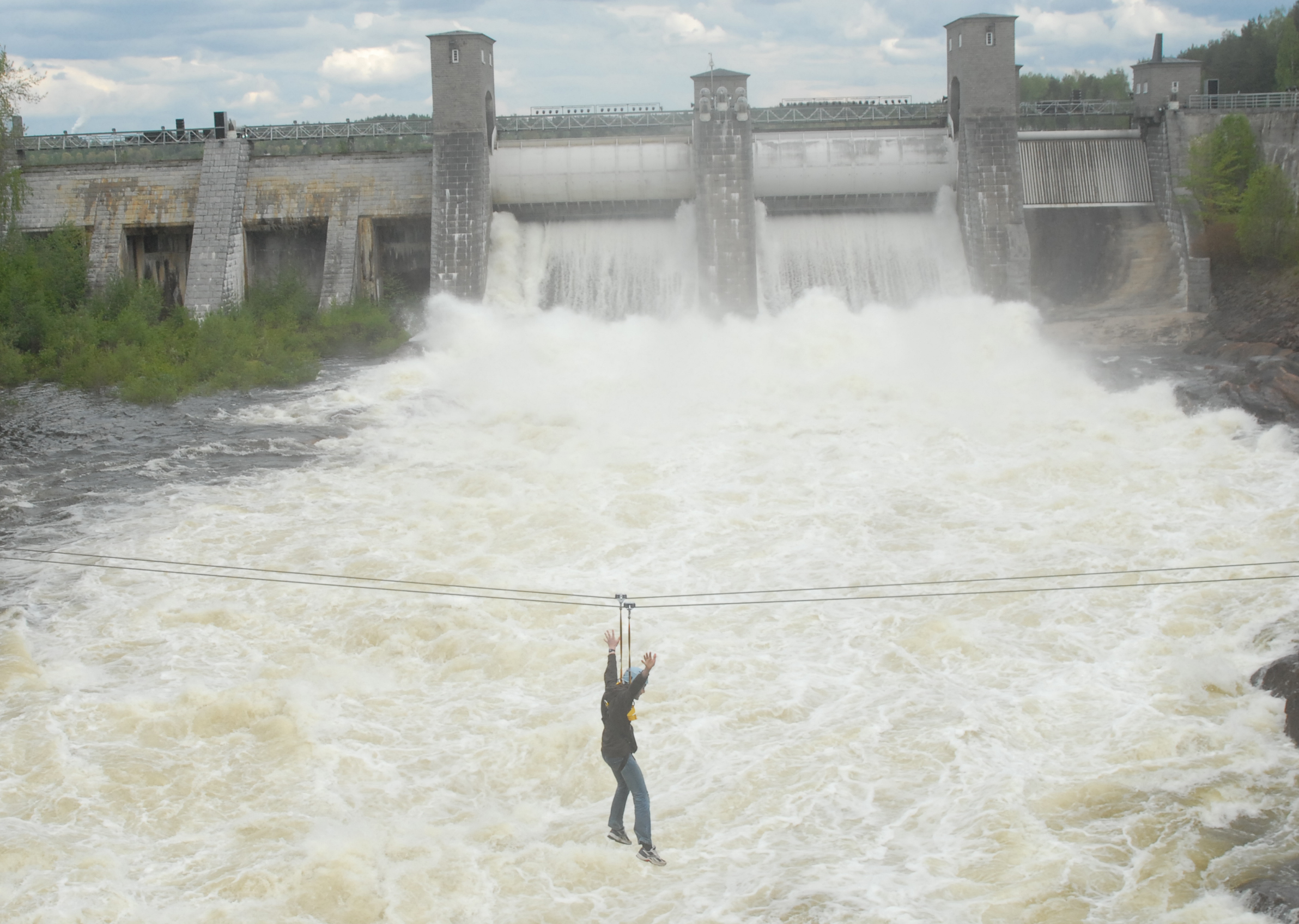 Imatrankosken vaijeriliuku sillalta padolle päin